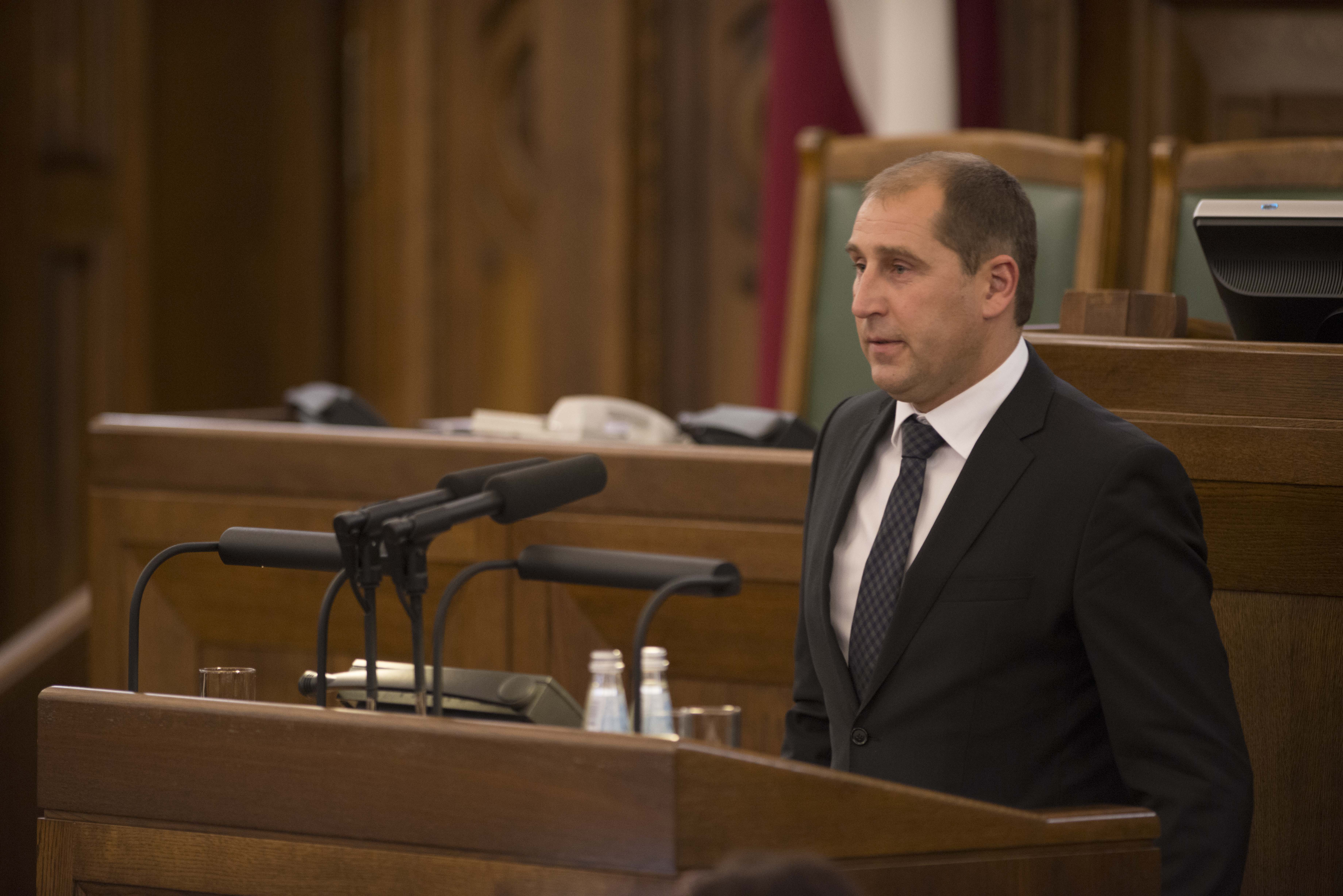 2014.gada 4.novembris. Deputāts Artis Rasmanis dod svinīgo solījumu. Foto: Juris Vīgulis, Saeimas Kanceleja Izmantošanas noteikumi: saeima.lv/lv/autortiesibas